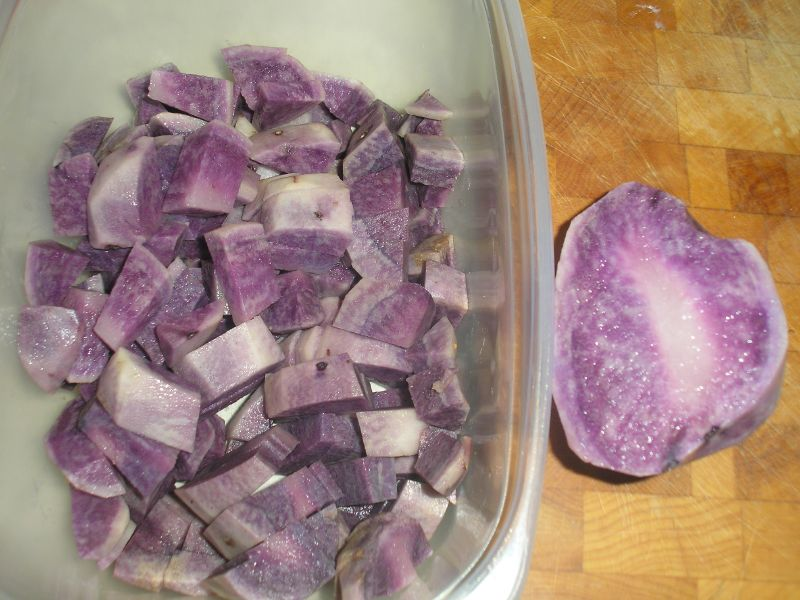 Adirondack Blue